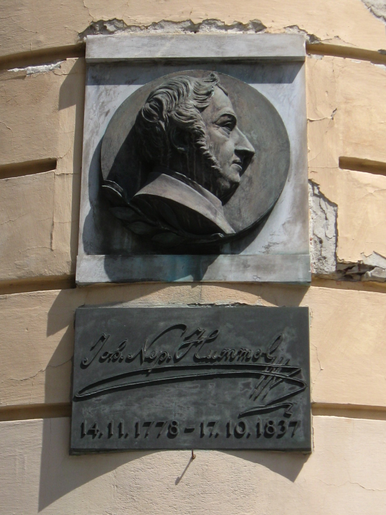 Gedenktafel für Johann Nepomuk Hummel an seinem Geburtshaus in Bratislava